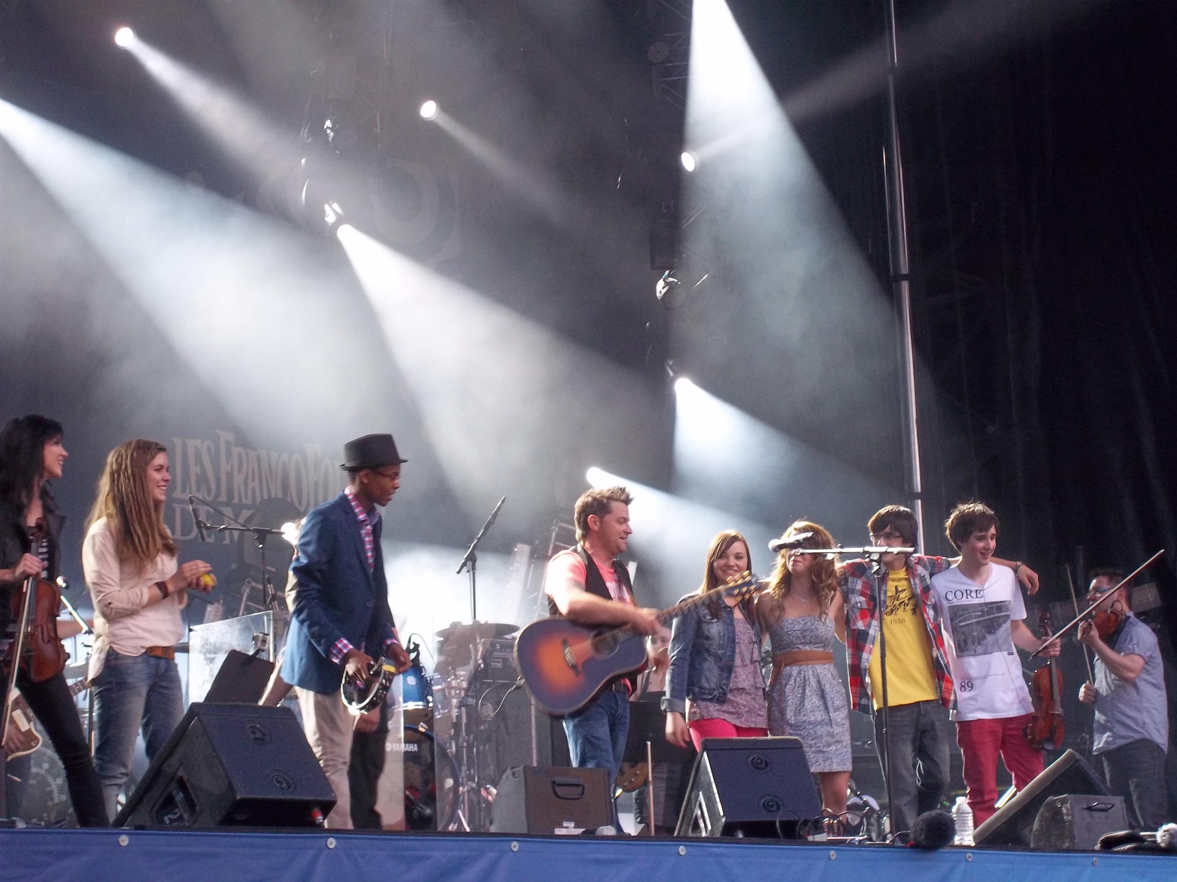 Patrick Groulx a offert une performance à Montréal le 10 juin 2012 dans le cadre des FrancoFolies. Il présente Jam, la relève musicale franco-ontarienne.